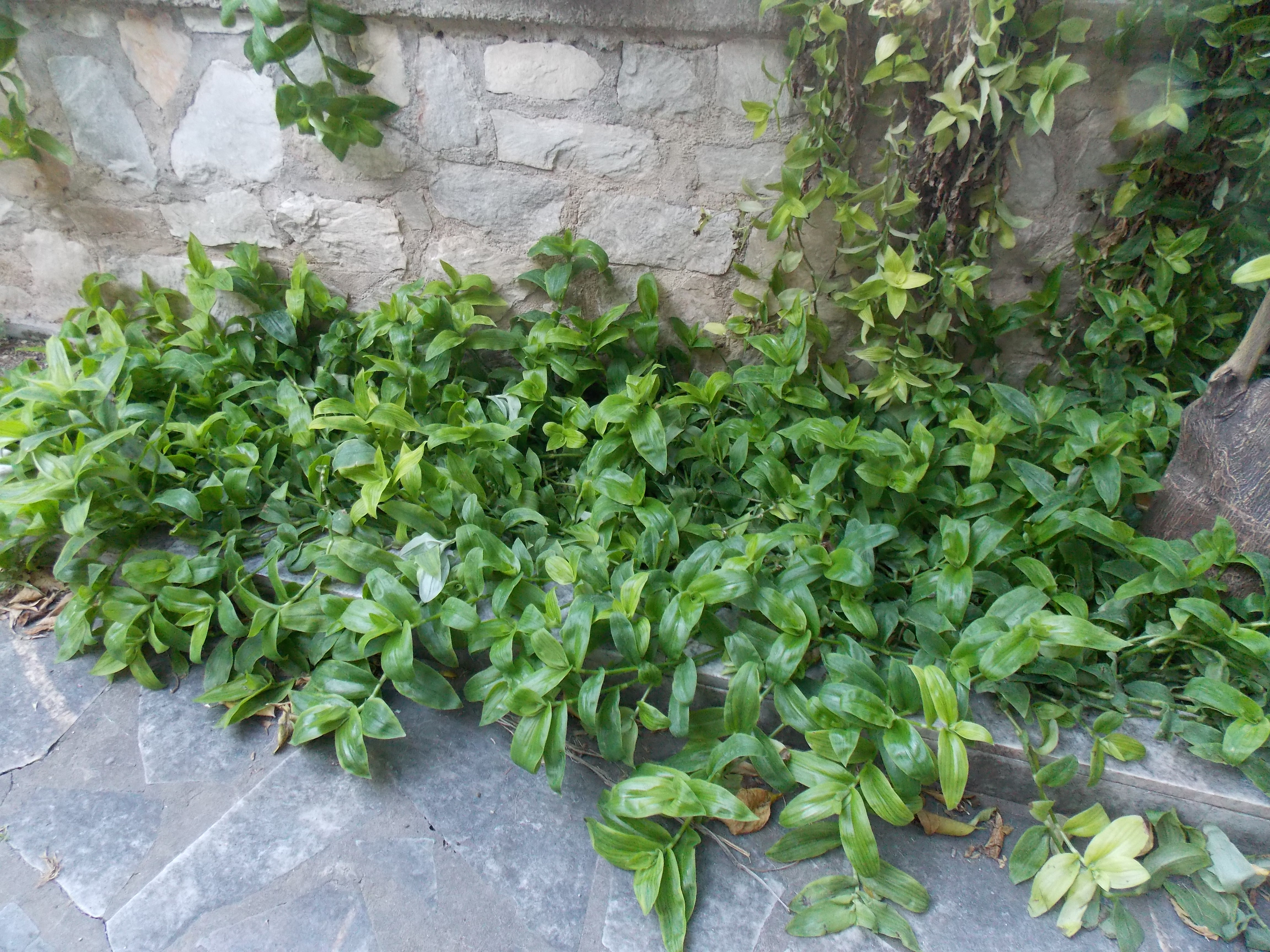 Photo taken in my garden